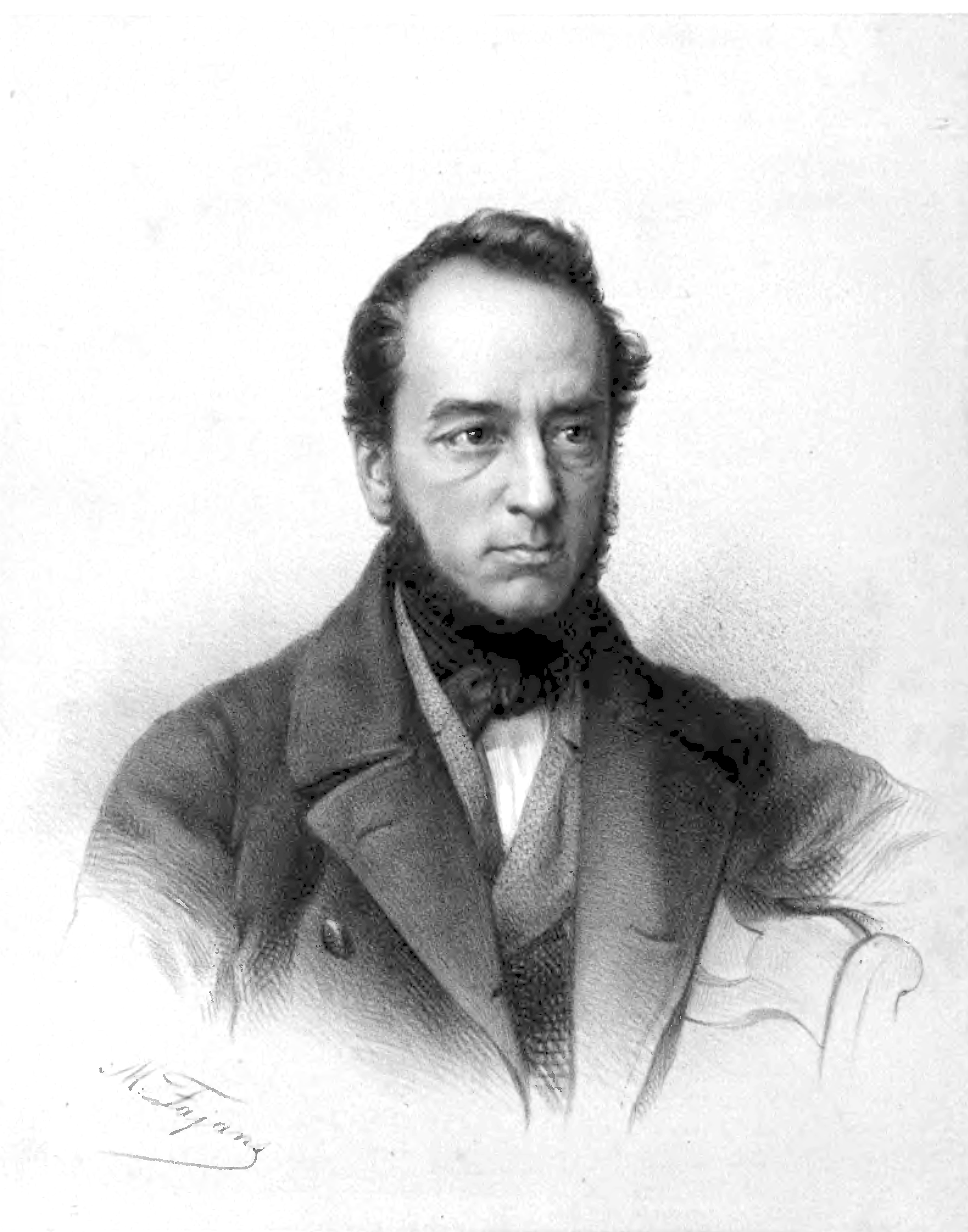 Kazimierz Wójcicki